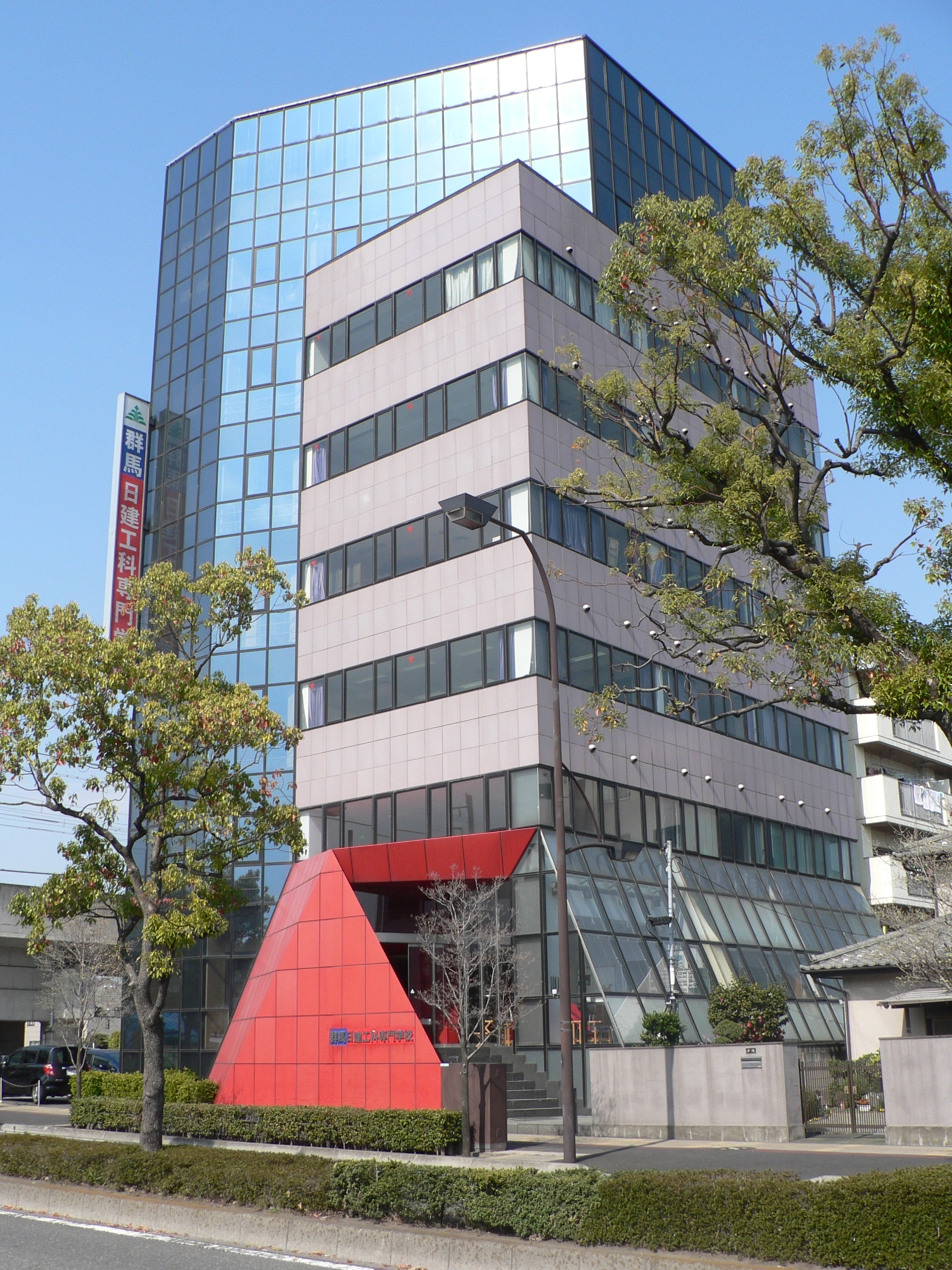 群馬県前橋市にある建築とインテリアの専門学校です。